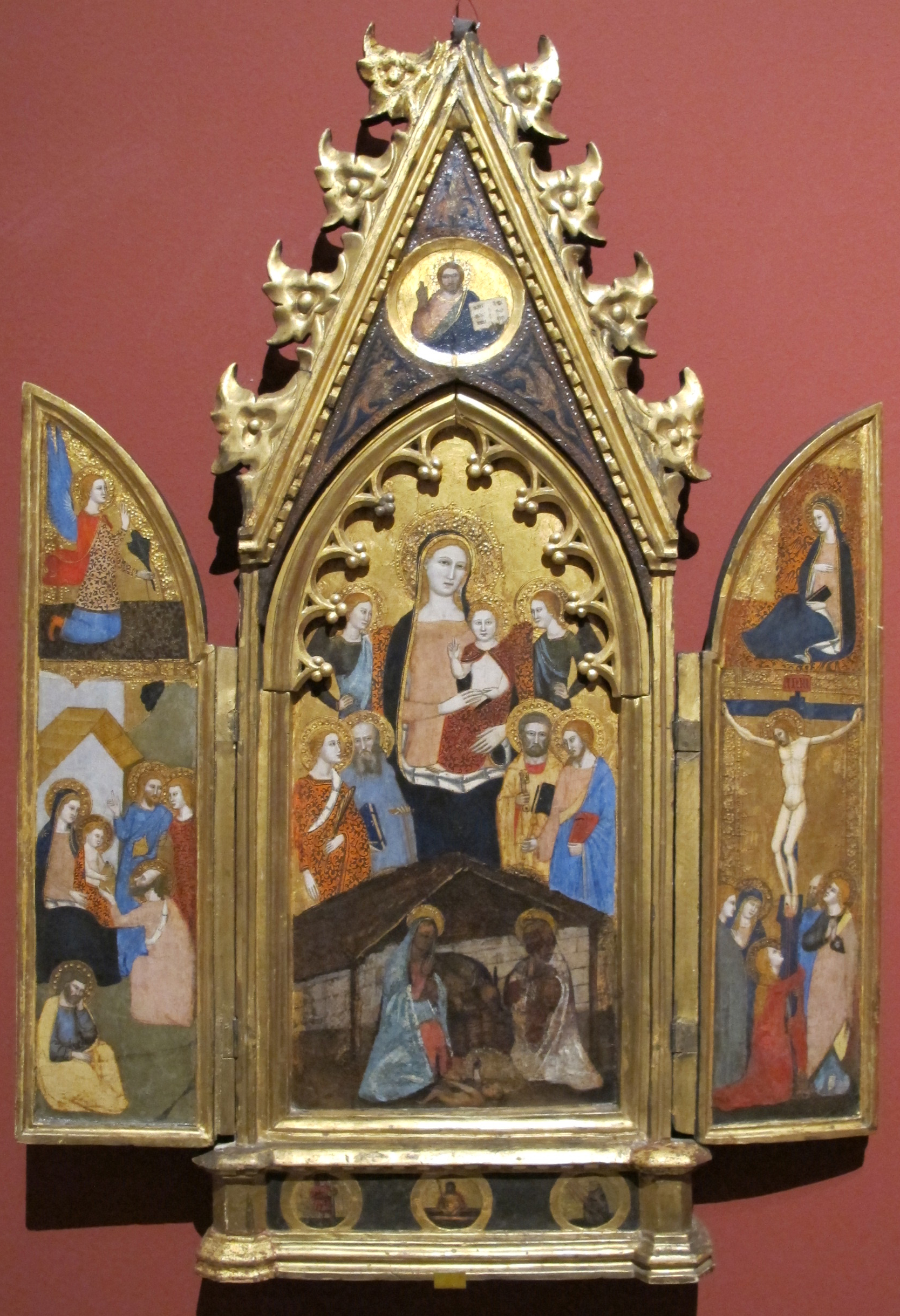 Andrea bonaiuti, madonna col bambino angeli e santi